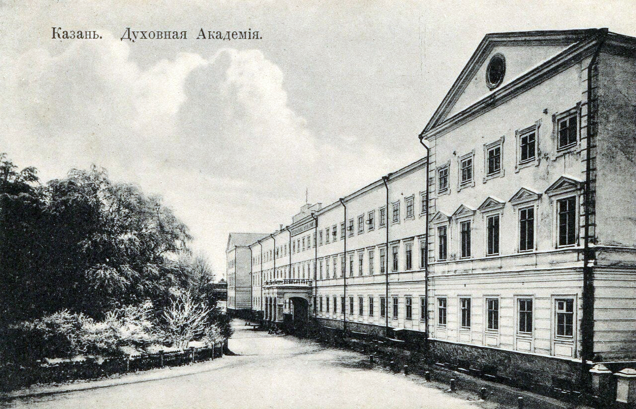 Казанская духовная академия